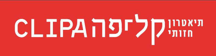 הלוגו החדש של תאטרון קליפה